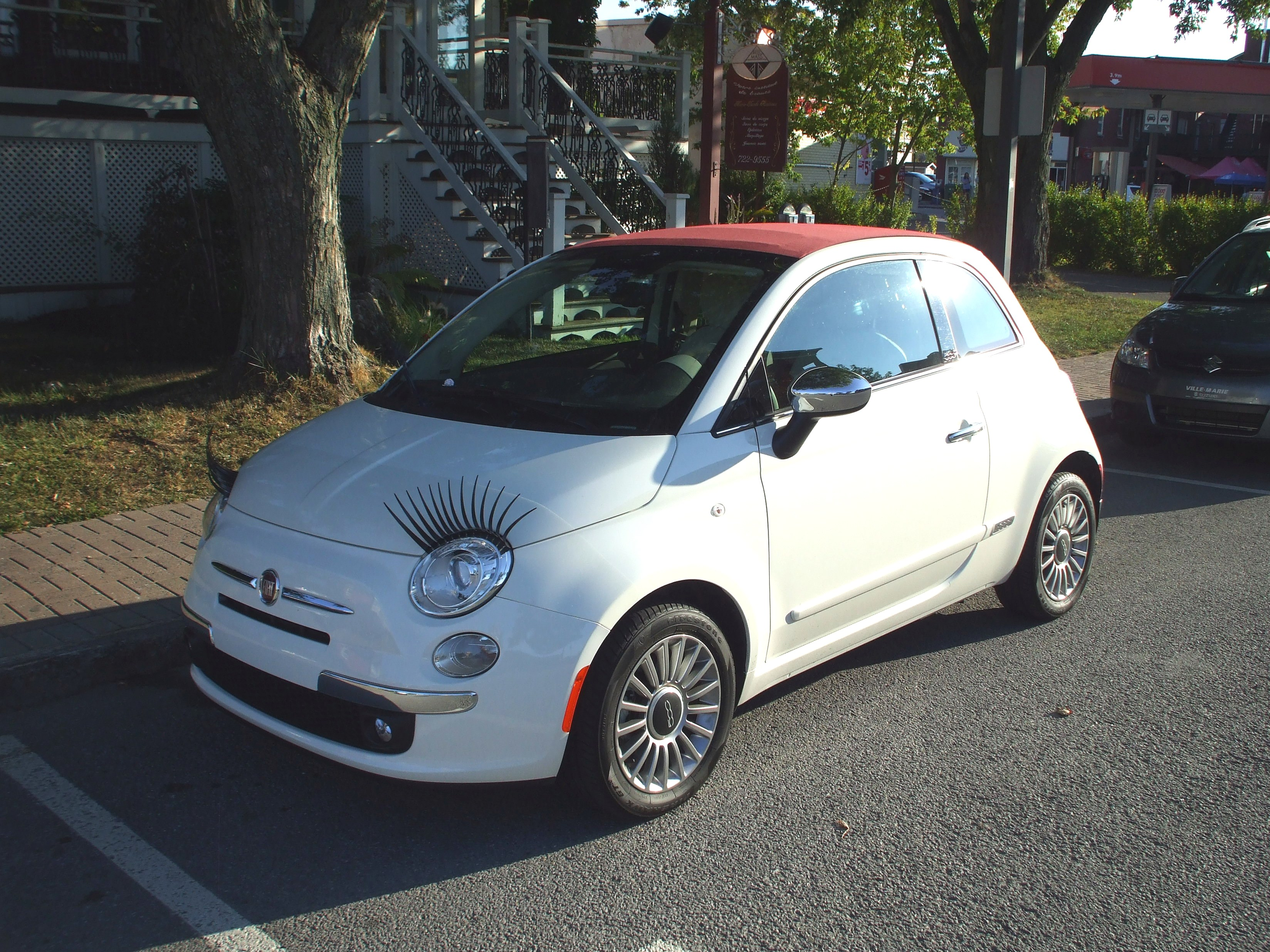 Spécial Fiat 500 à Rimouski Qc, Canada